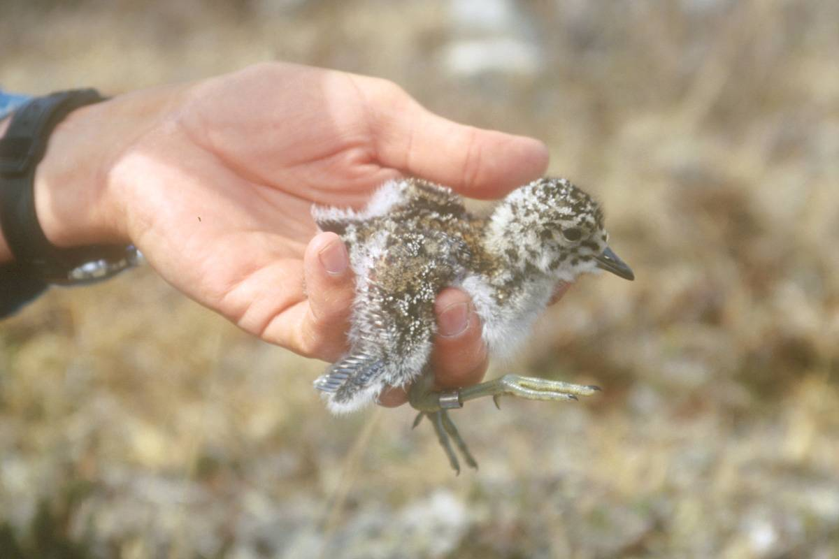 Aphriza virgata juvenile at Lake Clark National Park & Preserve, Alaska, USA